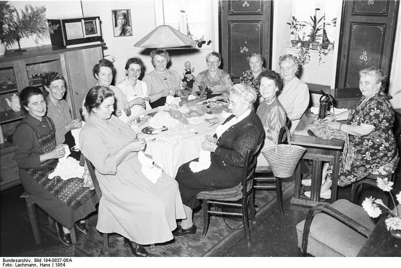 Evangelische Frauenhilfe beim Strümpfestopfen für Heimkinder. Innere Mission, Altenkirchen, 1954